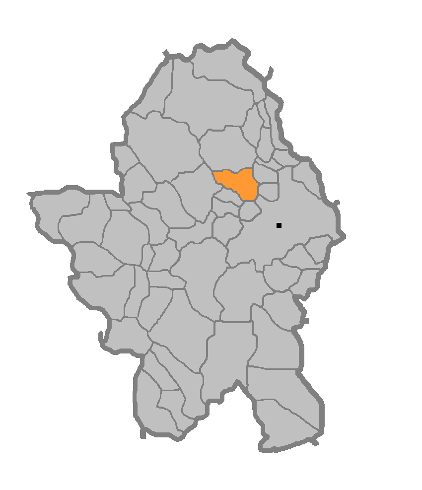 Мјесна заједница Мотике